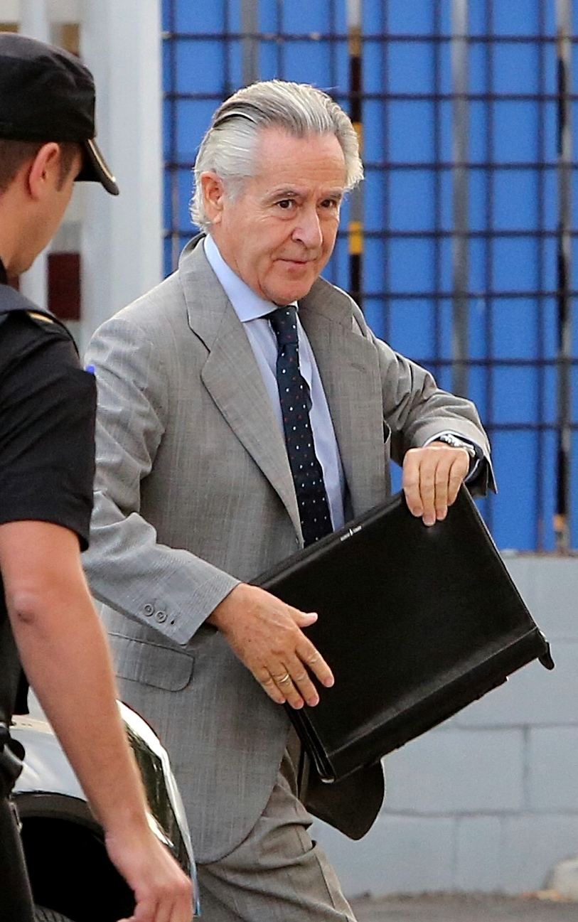 Miguel Blesa entrando en el juicio de las tarjetas black.